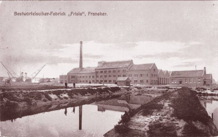 De foto toont de fabriek met op de voorgrond de haven voor het lossen van de bietenschepen. De haven stond in verbinding met het Van Harinxmakanaal. De foto is van 1925.